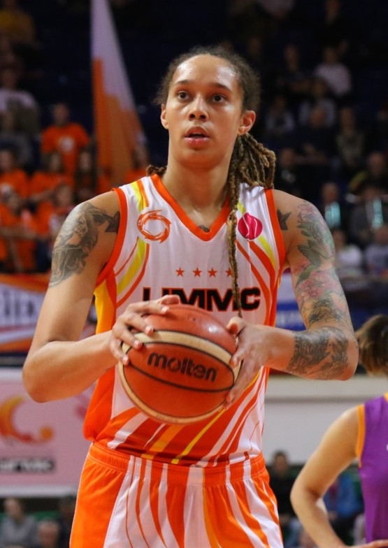 УГМК Екатеринбург – ТТТ Рига (Латвия) 78:45